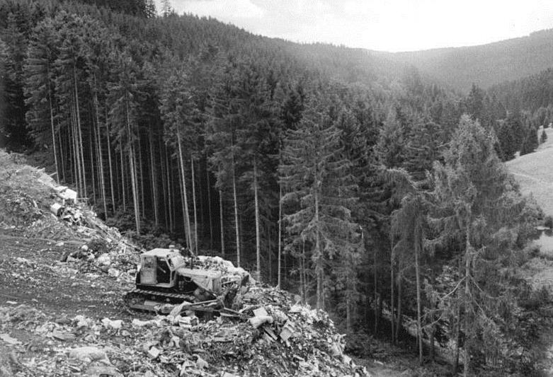 Katzhütte, Mülldeponie ADN-ZB Hirschberger-22.8.90 Bez. Suhl- Müll- Eine offizielle Deponie ist dieser Müllplatz mitten im Thüringer Wald bei Katzhütte. Unterhalb der Kippe plätschert ein munteres Waldbächlein. Die Bäume haben (noch) keine erkennbaren Schäden. Und der Dreck ist erstmal außer Sichtweite der Verursacher.